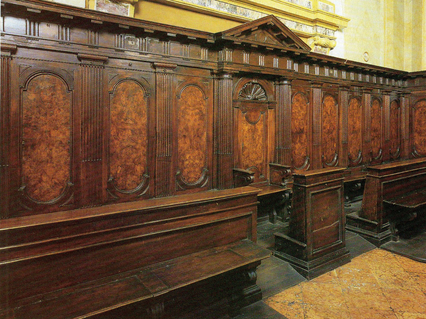 San_lorenzo_brescia_coro.jpg